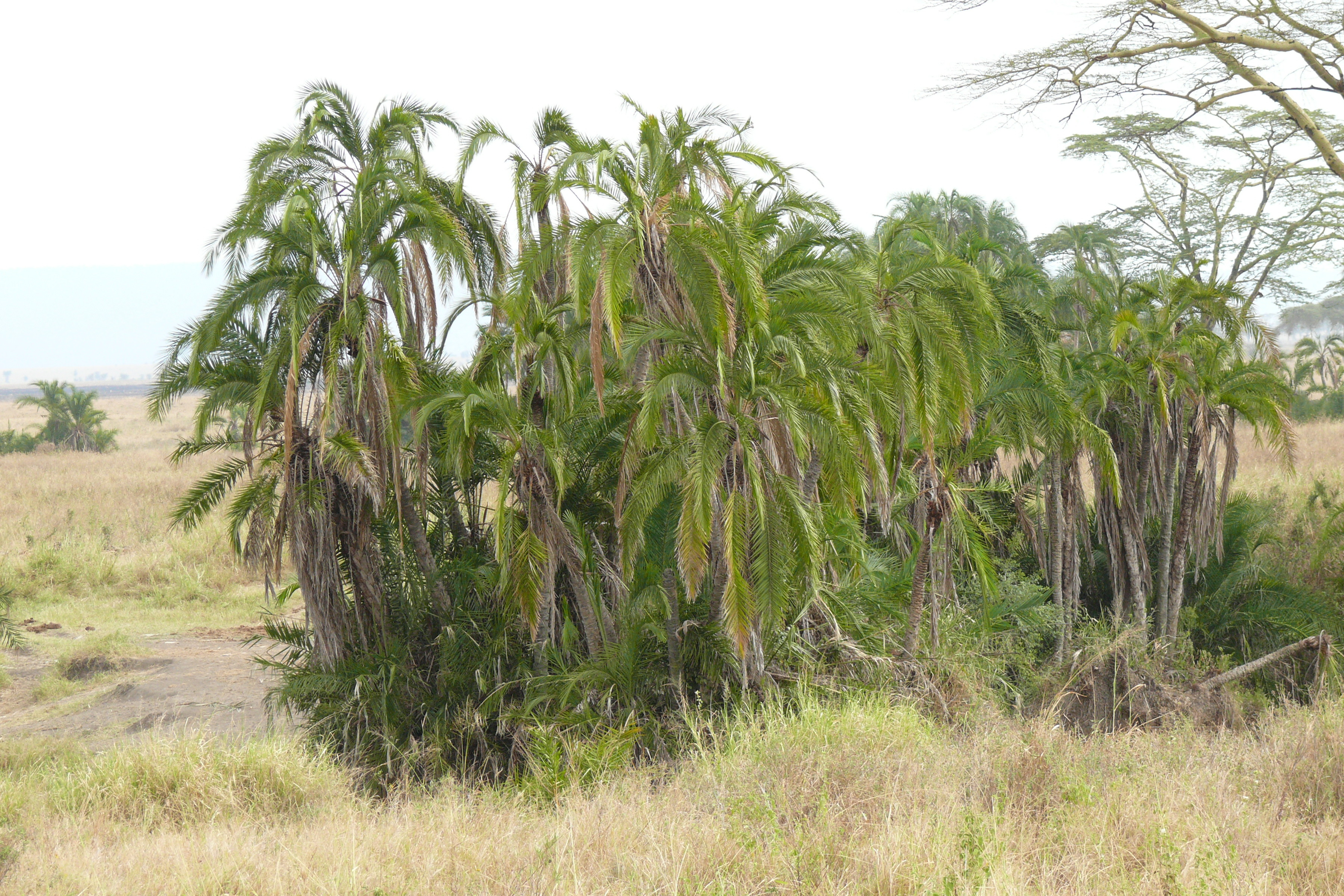 Senegalesische Dattelpalme (Phoenix reclinata)